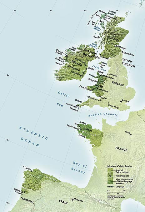 Mapa de las nacionales celtas